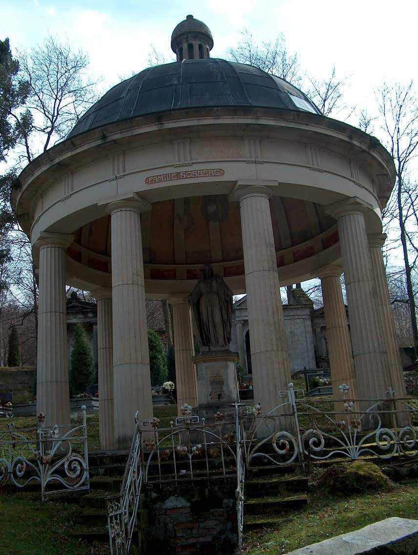 Lwówek Ślaski – Grobowiec rodziny Hohbergów na cmentarzu komunalnym.